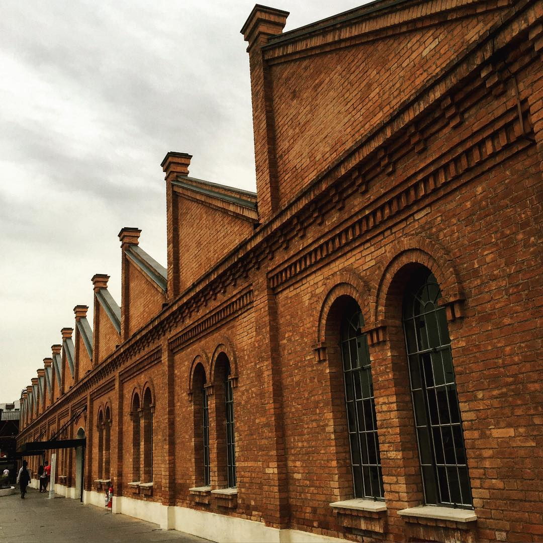 Patio Cianê Shopping